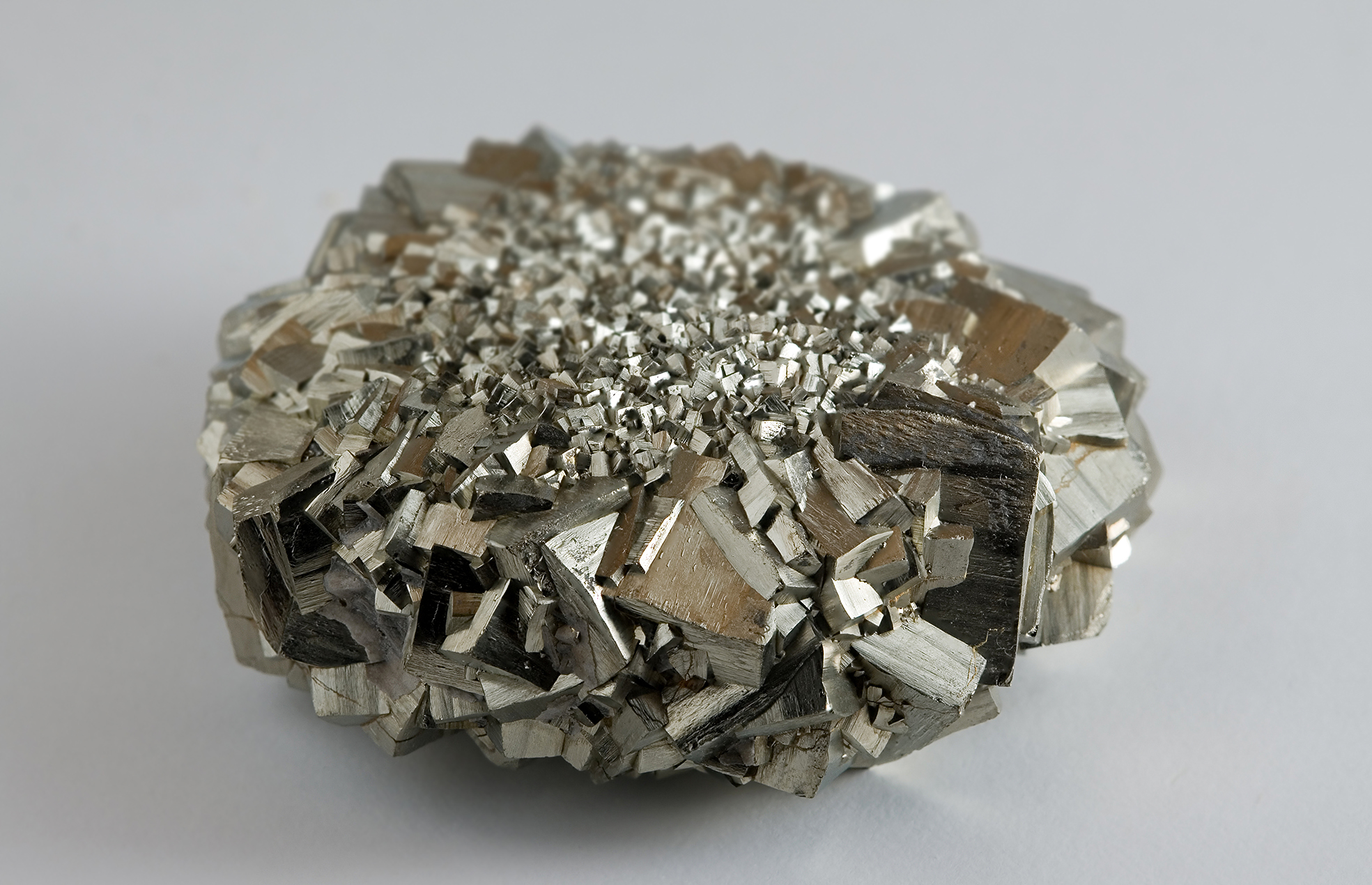 1.2 only